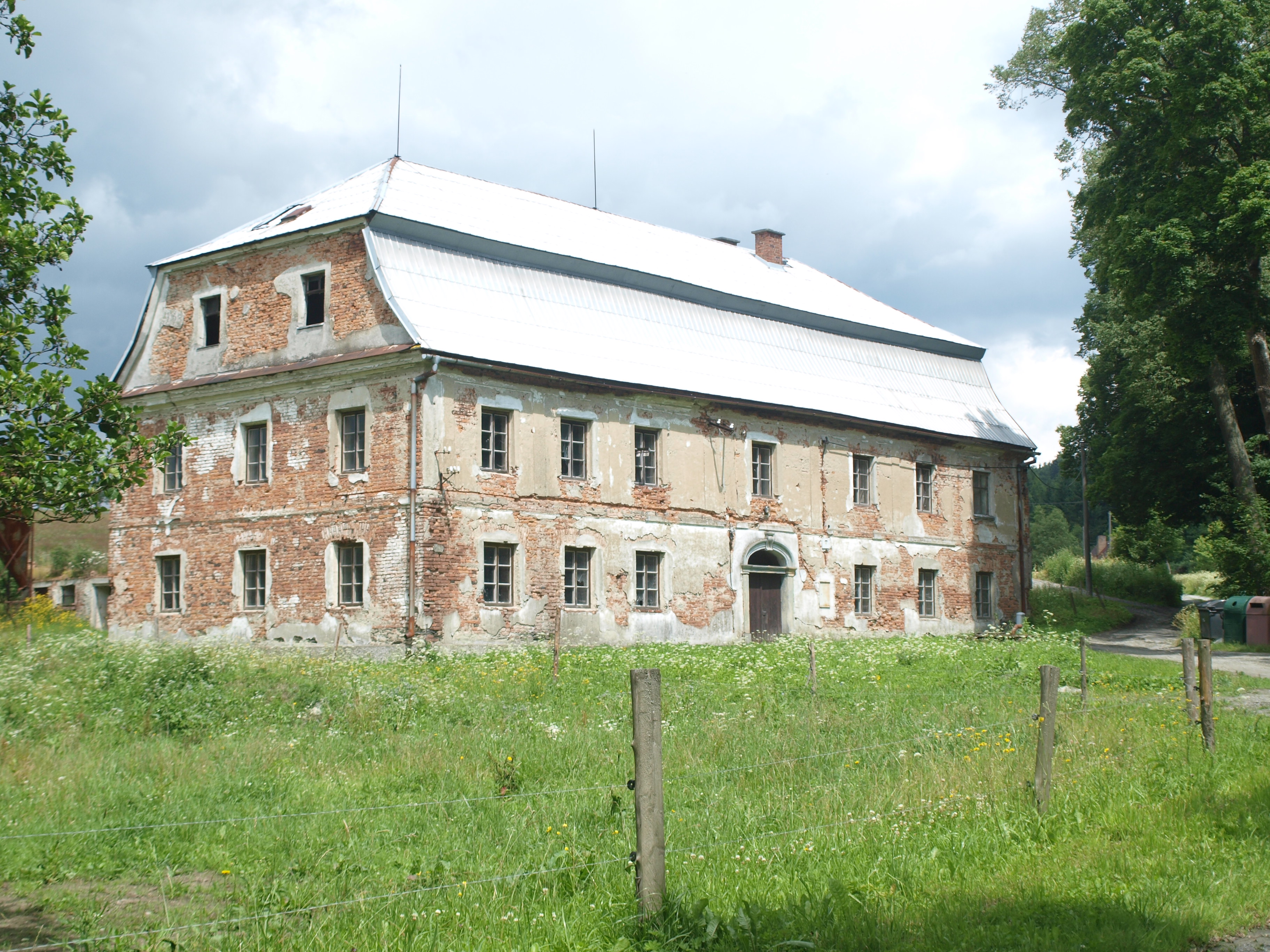 Rychta ve Veveří